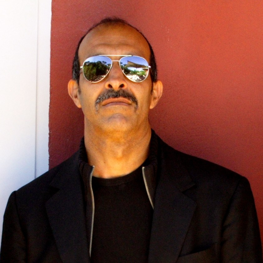 l'attore Jonis Bascir